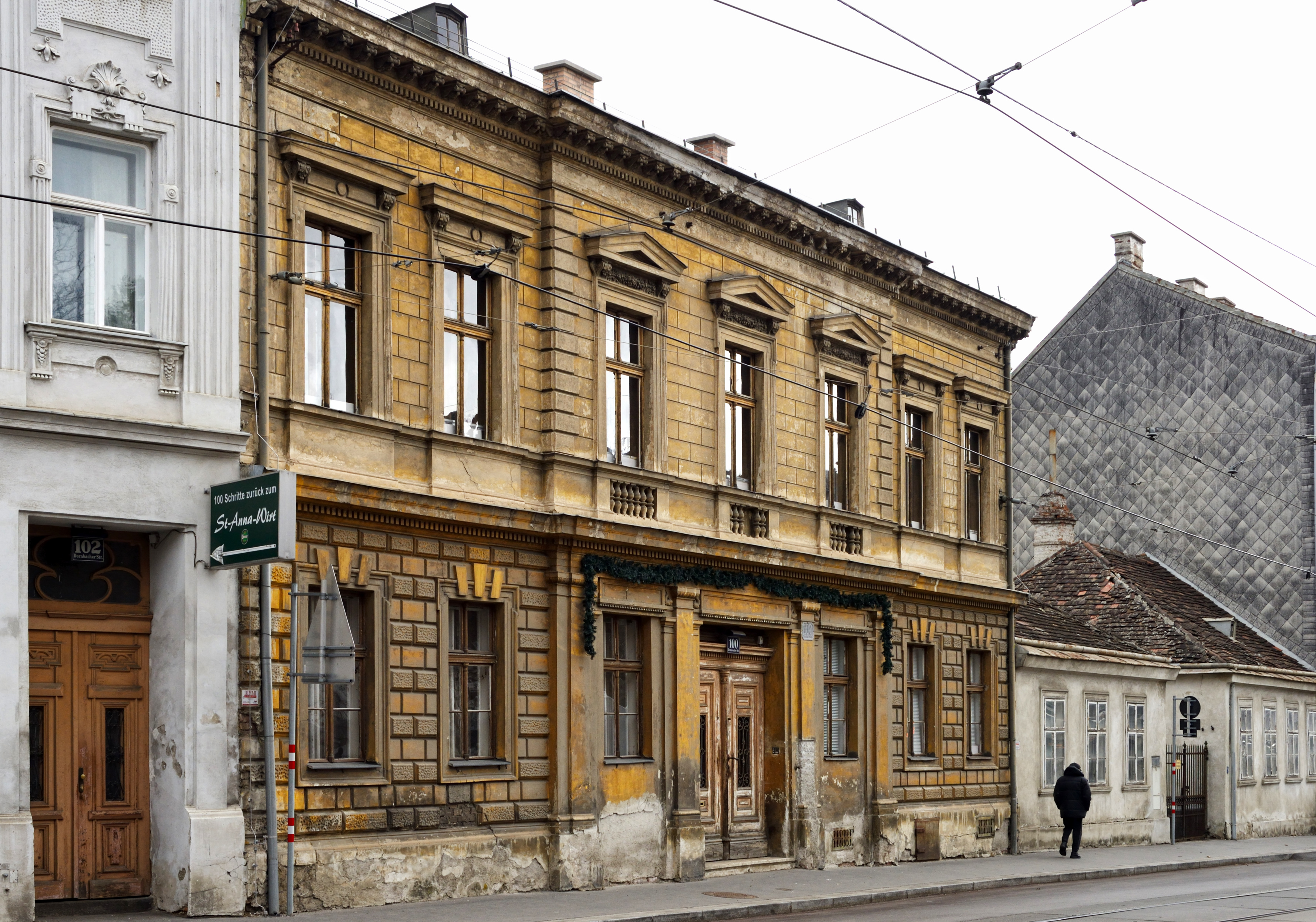 Gründerzeit-Haus, Dornbacher Straße 100 (Bauperiode: 1860-1883; Architekt: Franz Glaser sen.; 1889 Adaption durch Franz Glaser jun. und Heinrich Glaser)